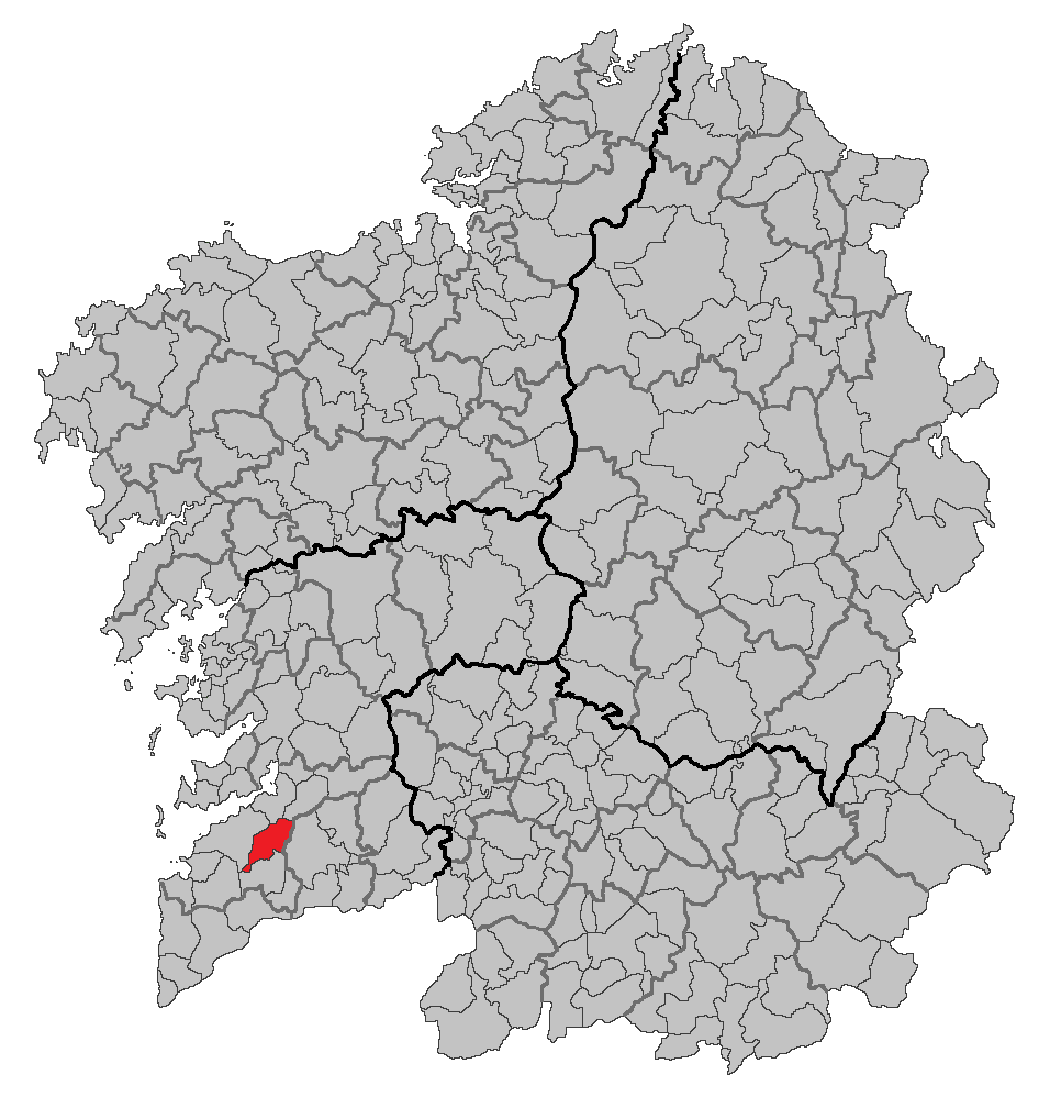 Mapa coa localización do concello de Mos.